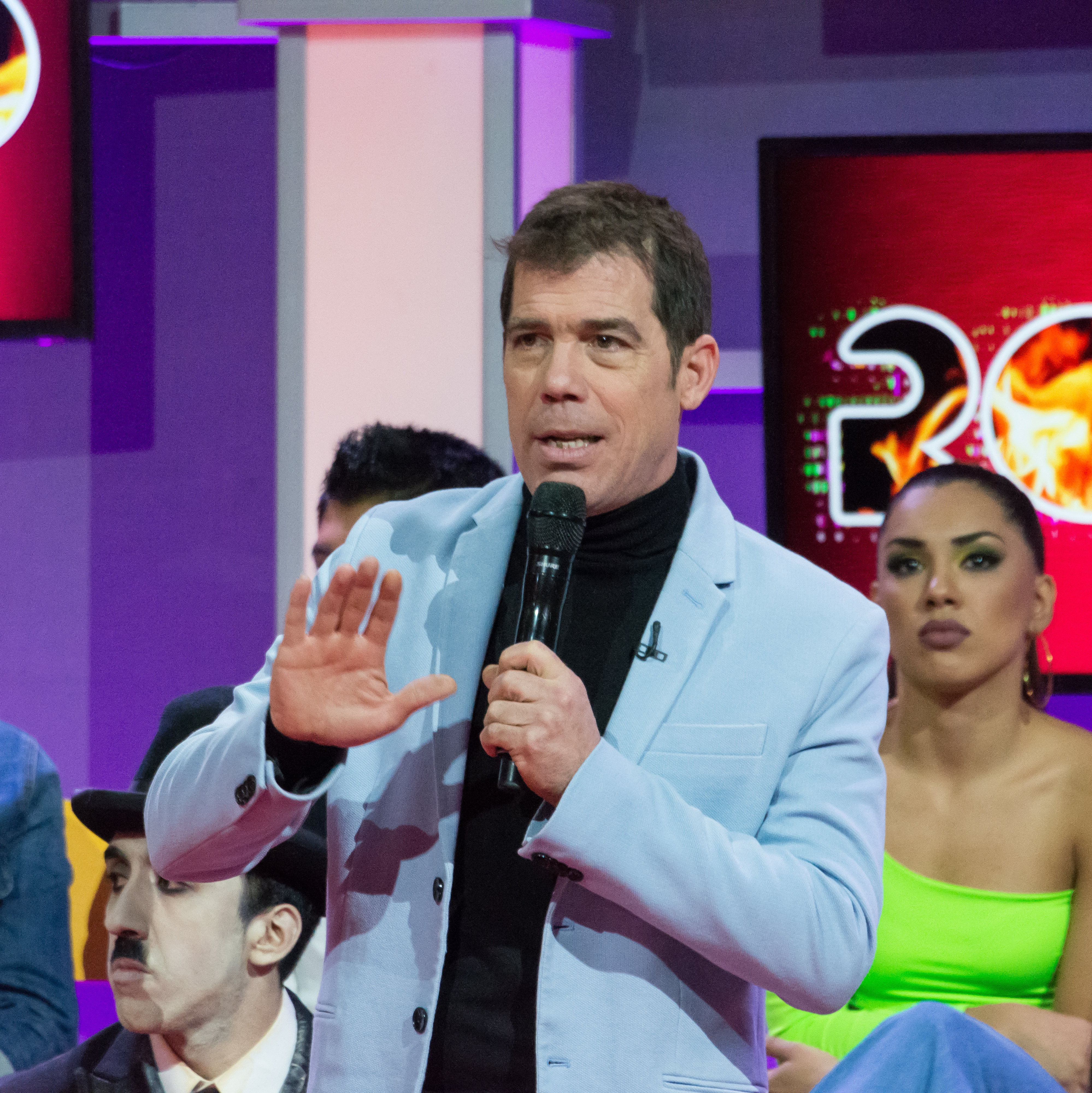 Álvaro Escobar, Rojo, Televisión Nacional de Chile, Santiago, Chile.